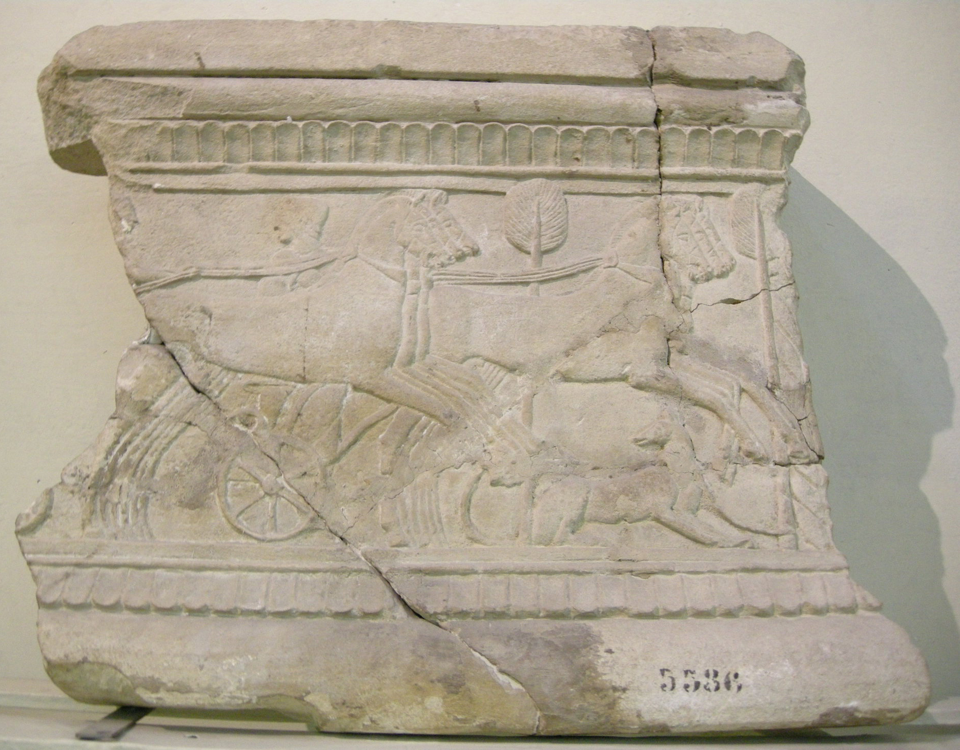 Urnetta cineraria da chiusi con cavalli